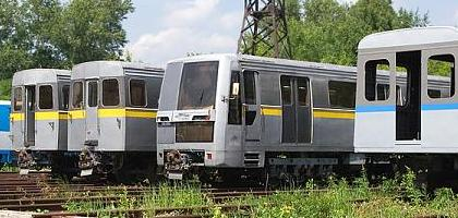 Опытные вагоны 81-720А/721А на территории завода Метровагонмаш